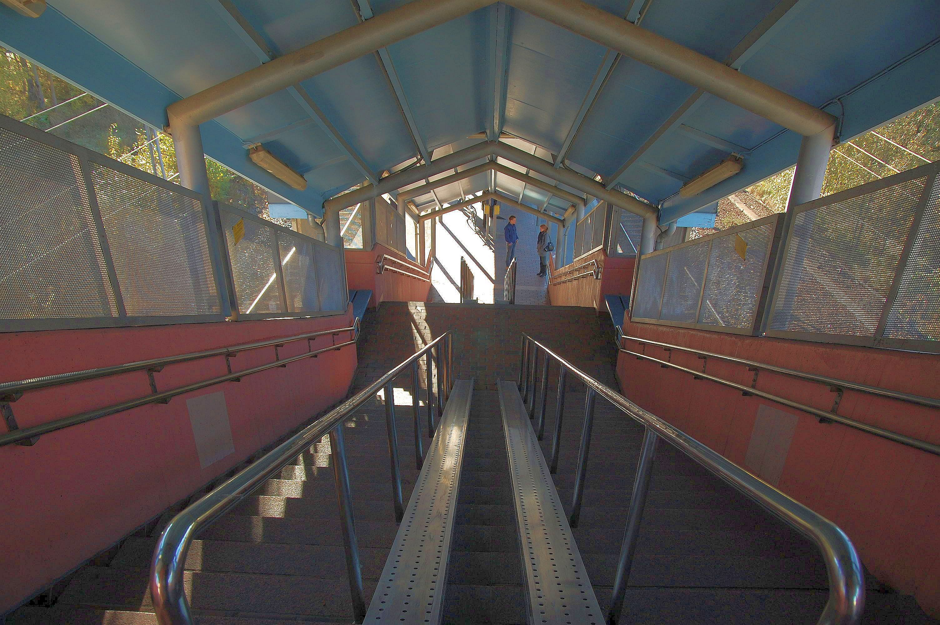 Stasjonsområdet med trappen er tegnet av NSB Arkitektkontor v/ Arne Henriksen. Prosjektet mottok Houens fonds diplom for 1988.